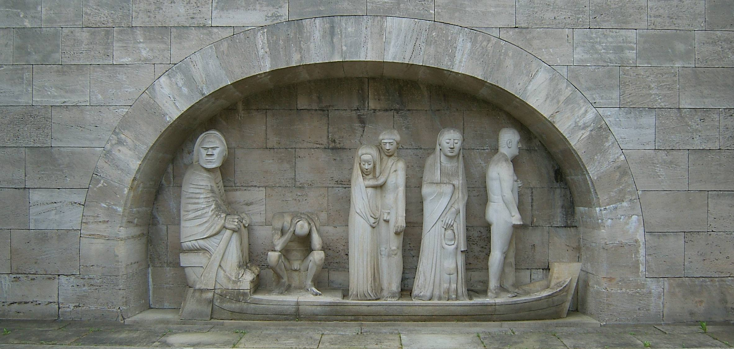 Bildbeschreibung: Hamburg, Friedhof Ohlsdorf, Denkmal Bombenopfer Fotograf: selbst Datum: 28.5.2006